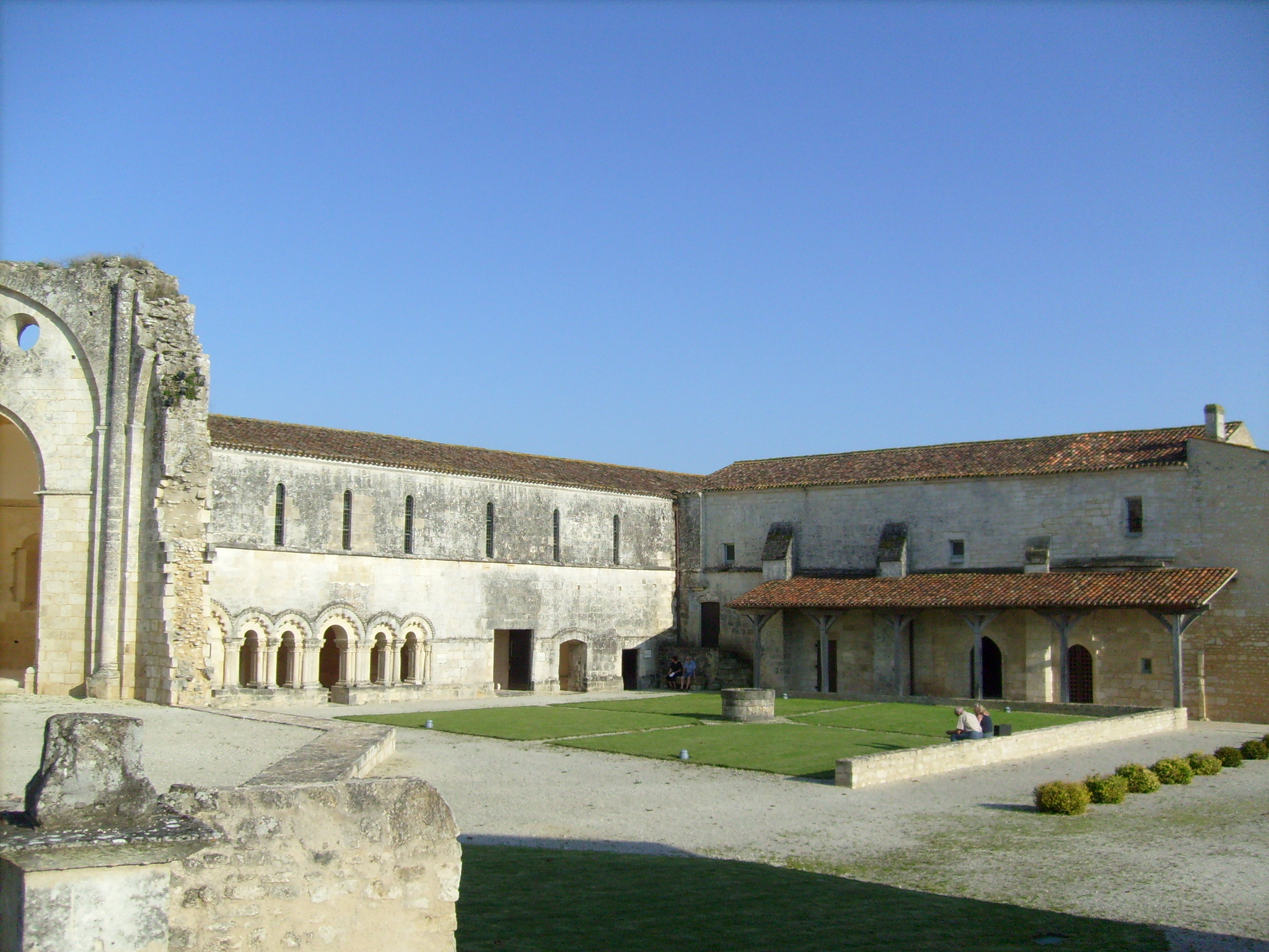 Bâtiments conventuels du prieuré de Trizay